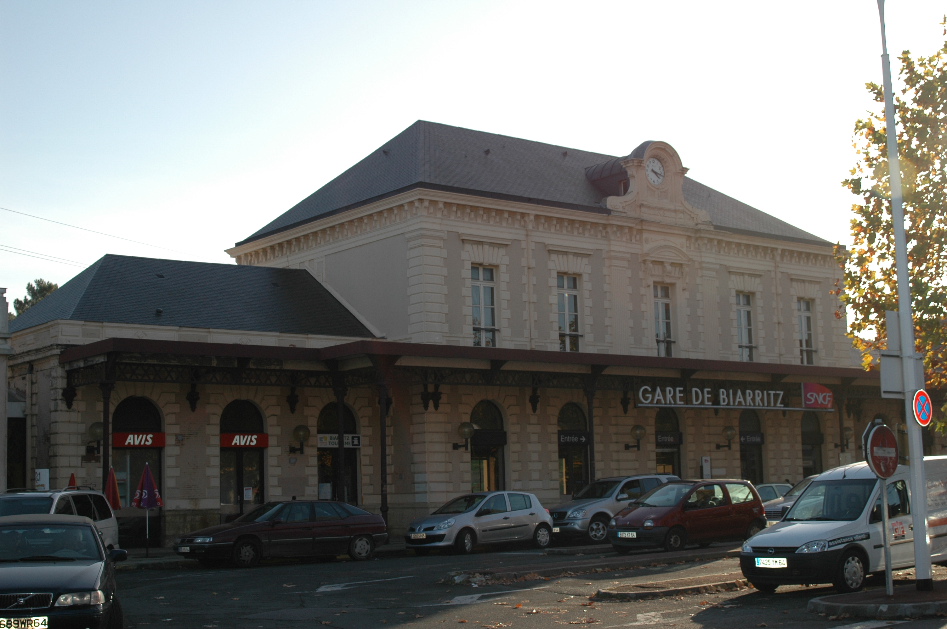 Biarritz, la gare de la Négresse